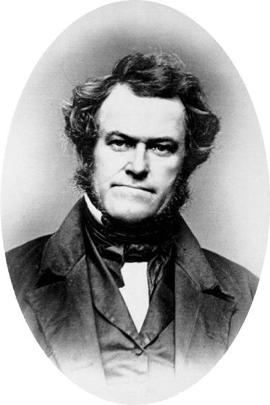 Virgil Delphini Parris